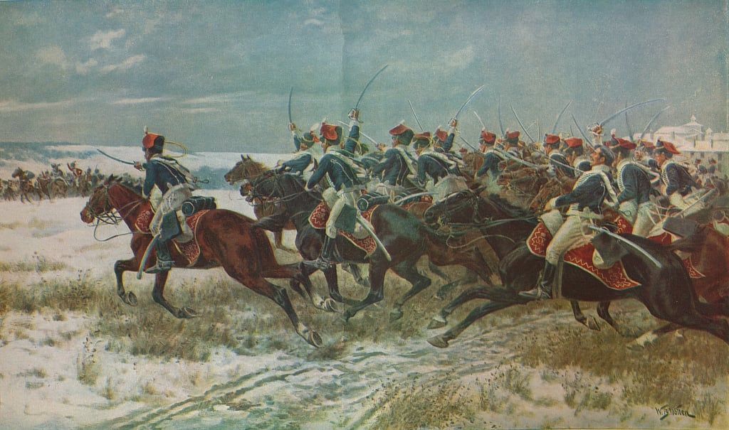 Charge des hussards britanniques à Benavente, le 29 décembre 1808.